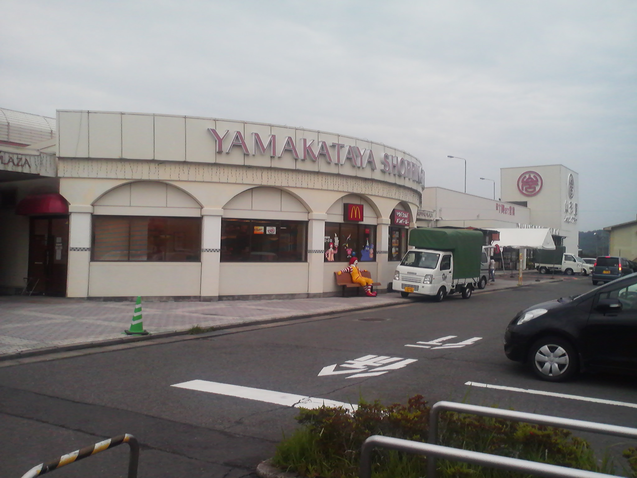 山形屋ストア皇徳寺店の外観